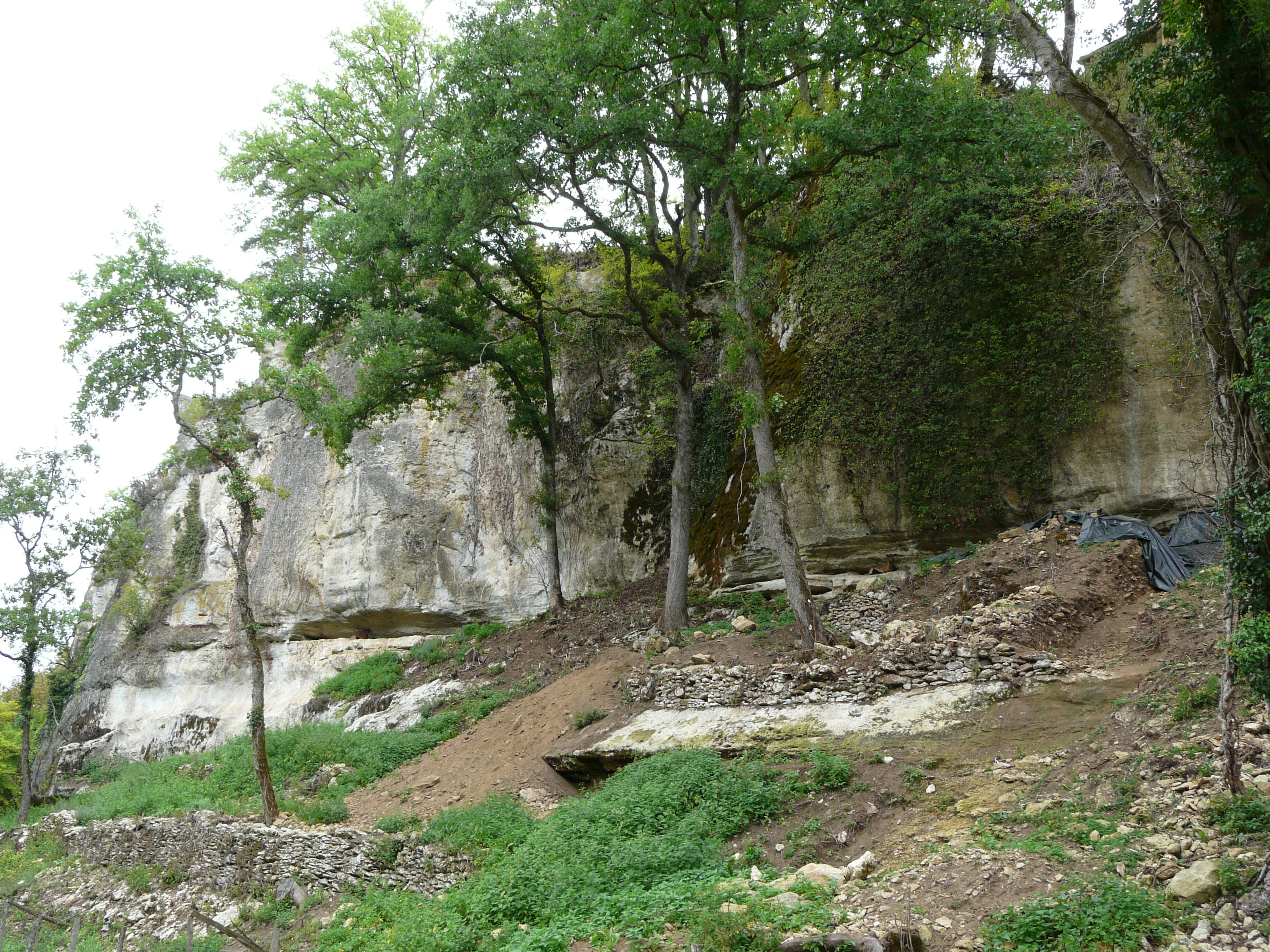 Fouilles au pied de l'abri Blanchard I, site préhistorique sur la commune de Sergeac, dans le vallon de Castel Merle, Dordogne, France. .